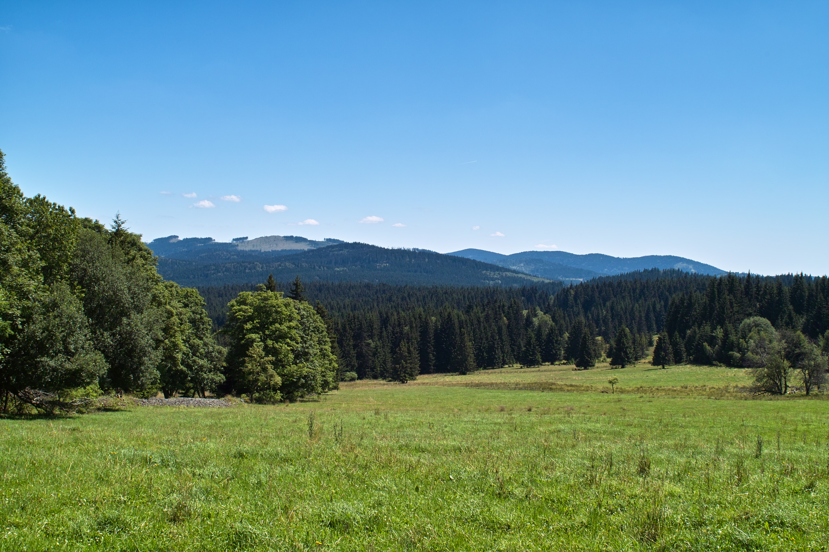 NPP Prameniště Blanice z Horní Sněžné